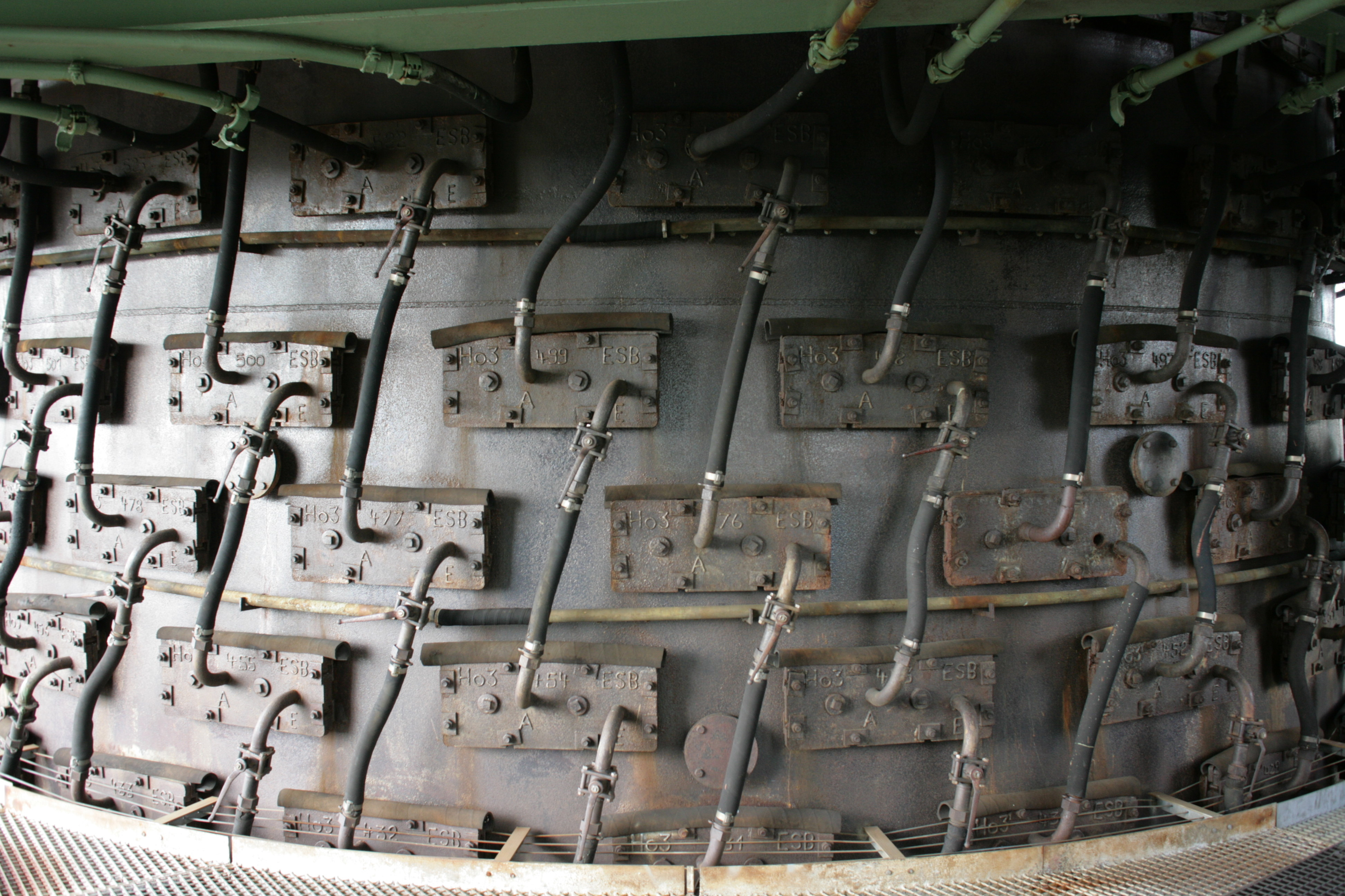 Wasserkühlsystem von Hochofen 3 der Henrichshütte in Hattingen